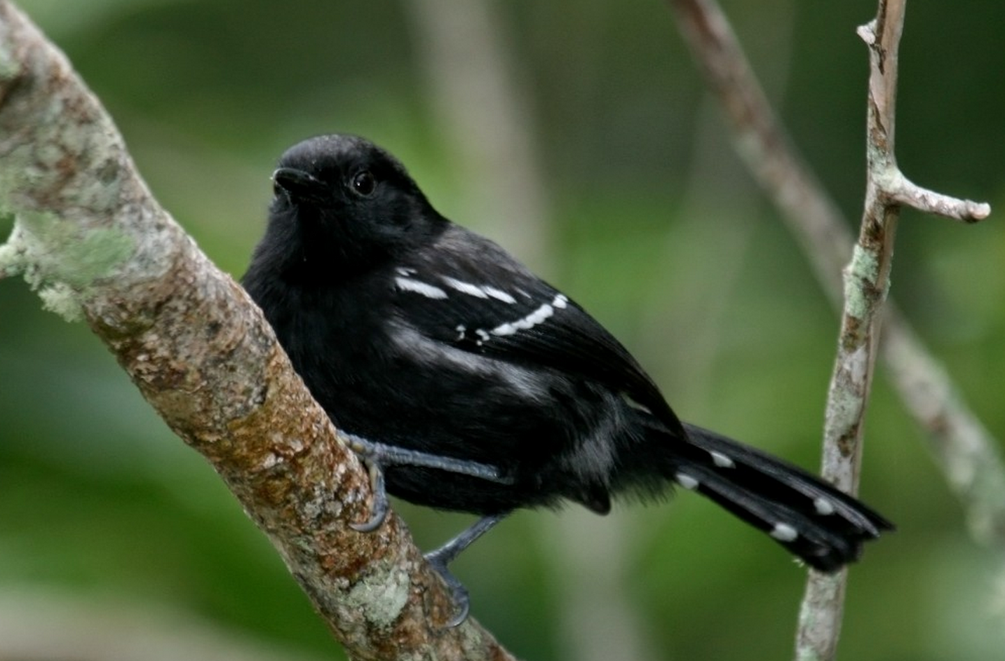 Exemplar adulto macho de Formicivora littoralis (now considered as subspecies of Formicivora serrana), Iguaba Grande, Rio de Janeiro. Foto realizada pelo Prof. Sávio Freire Bruno; em caso de uso, somente creditando-a e que a licença da obra originada seja sob Creative Commons. Espécie criticamente em perigo de extinção.